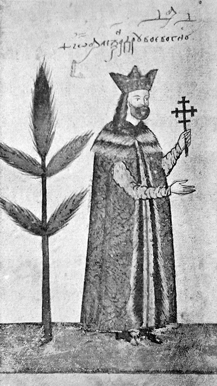 Alexandru II in Suceviţa monastery's Evangheliar.